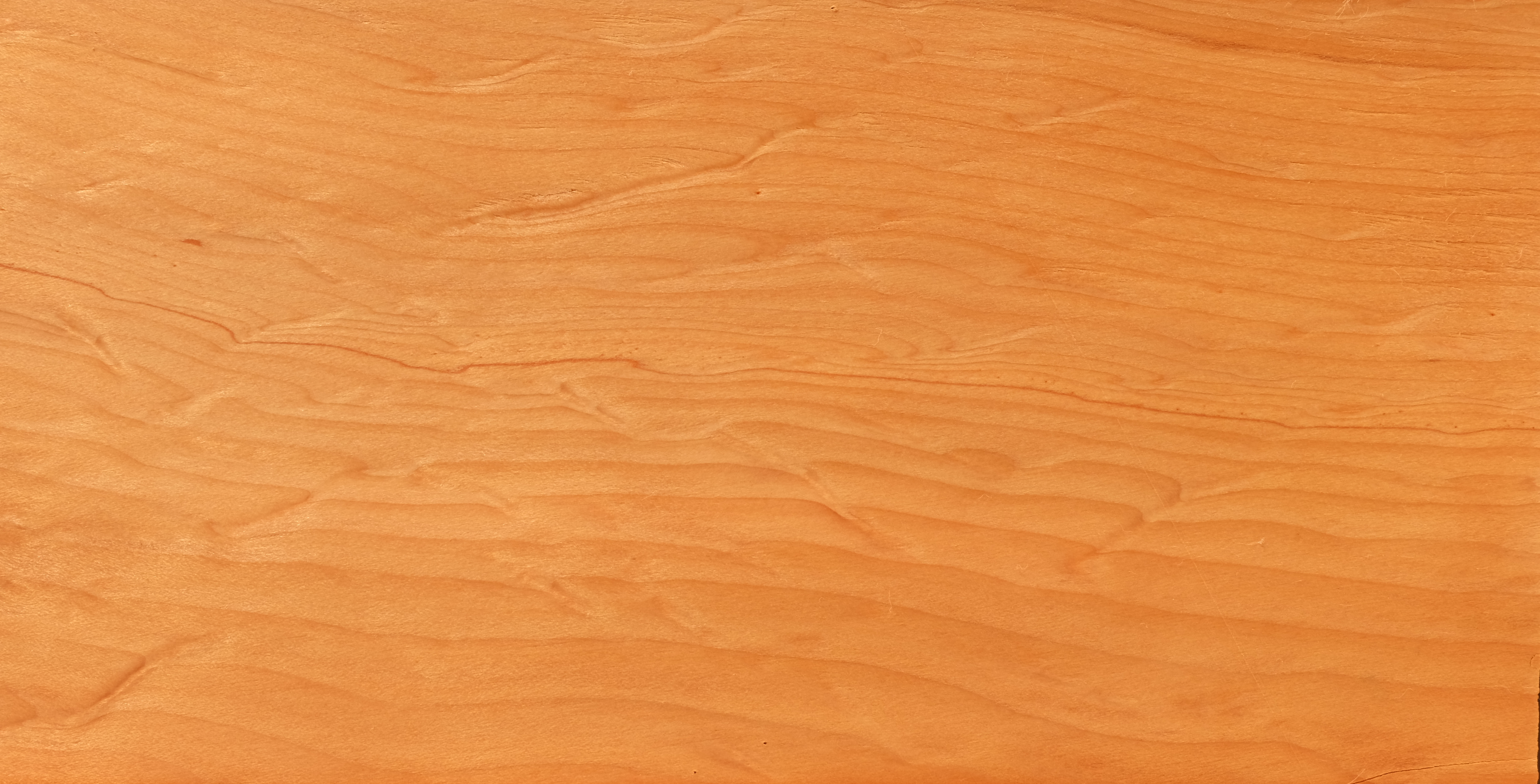 gemessertes Furnier; Holzart: ZED, Libanon-Zeder